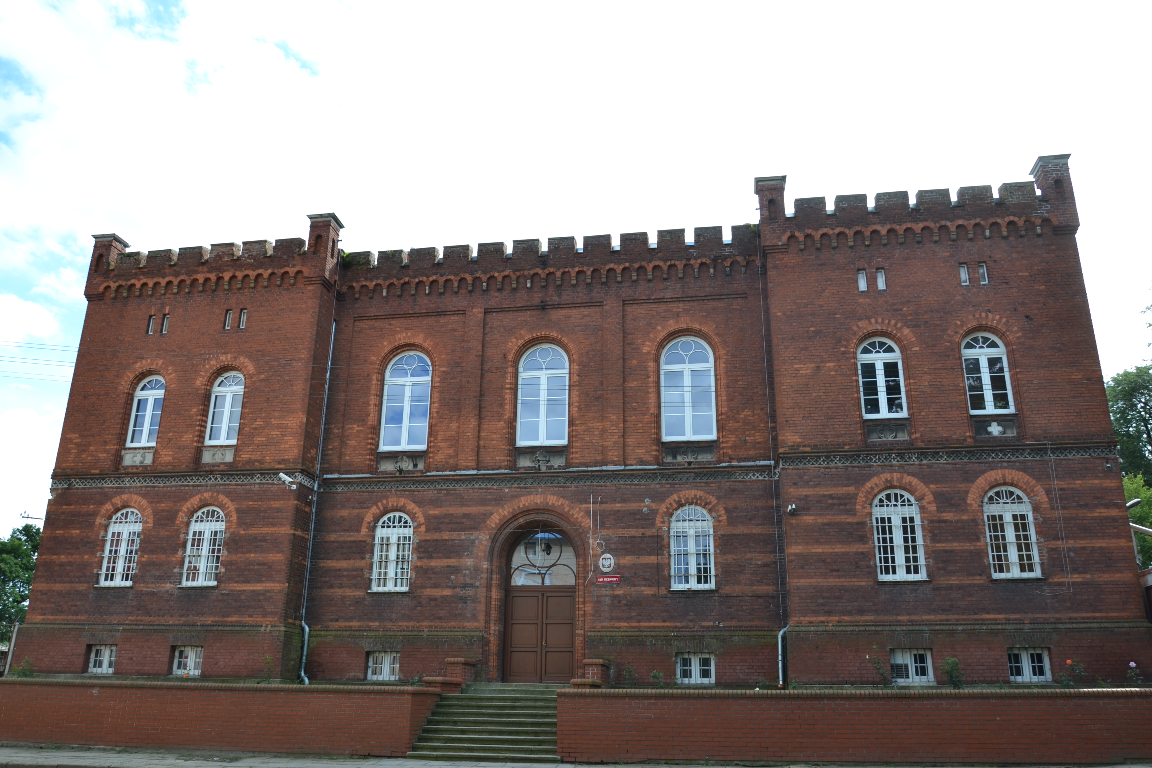 Sąd i areszt w Kamieniu Pomorskim